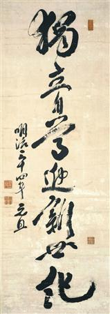 福沢諭吉遺墨「獨立自尊」